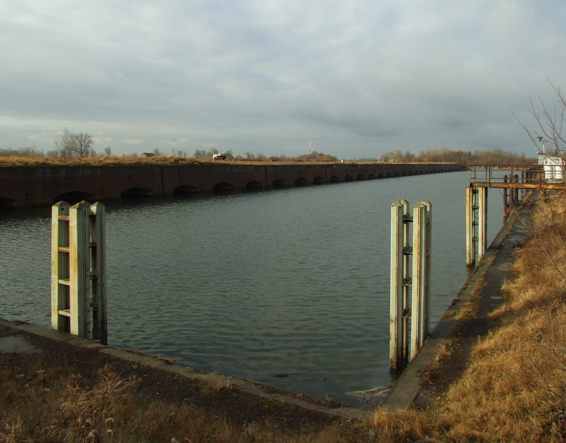 Cosel Oderhafen (Koźle Port) - Hafenbecken nr 3